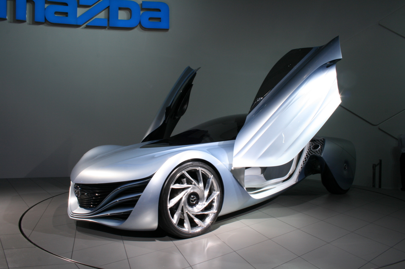 Mazda Taiki iin tokyo motor show